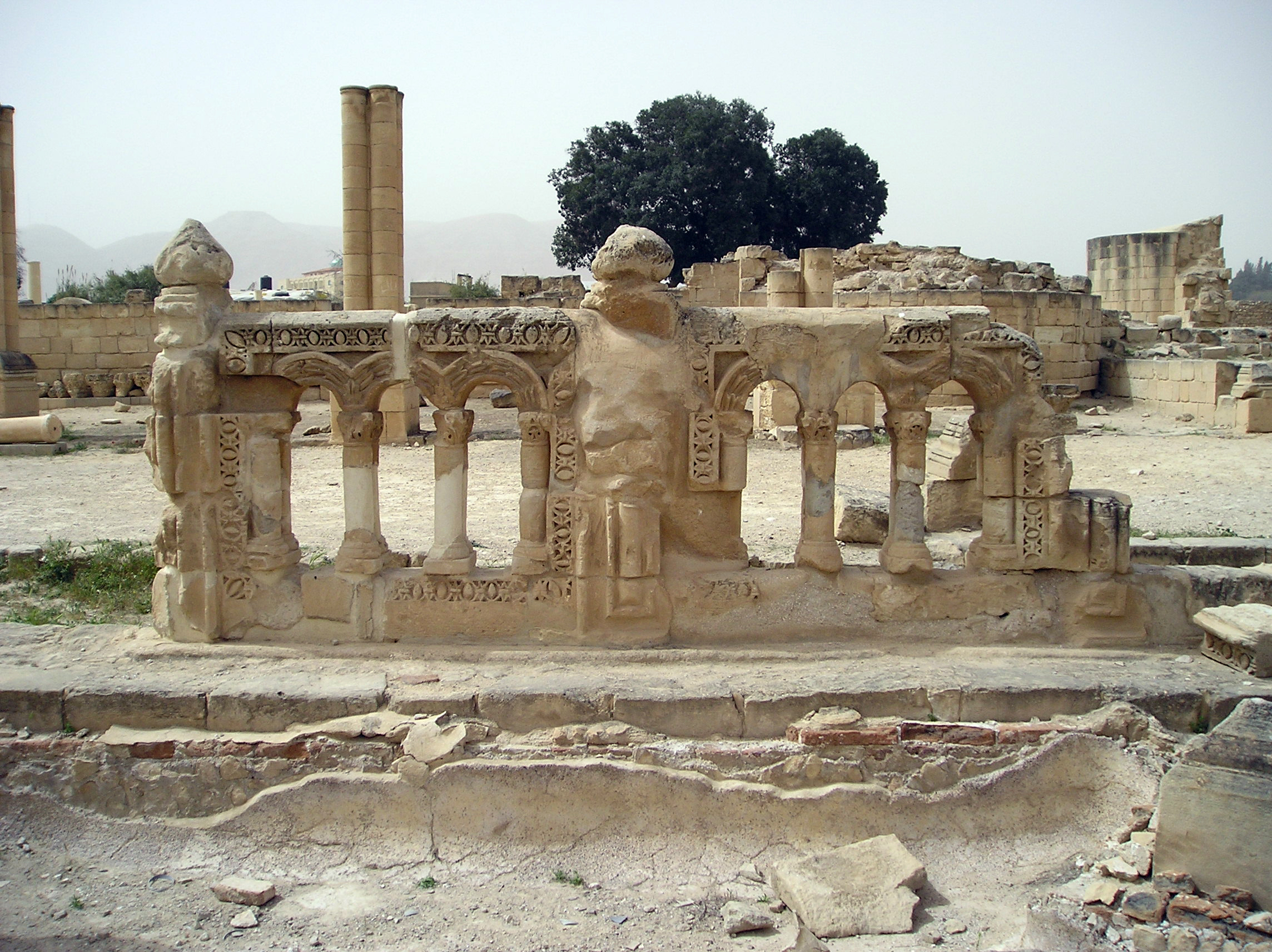 Pozostałości sadzawki w Pałacu z VIII w. w Khirbet al-Mafjar w Jerychu (Autonomia Palestyńska). Zdjęcie wykonał A. Sobkowski dn. 9 marca 2006.